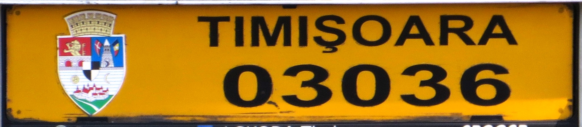 kentekenplaat uit Roemenië - Timișoara